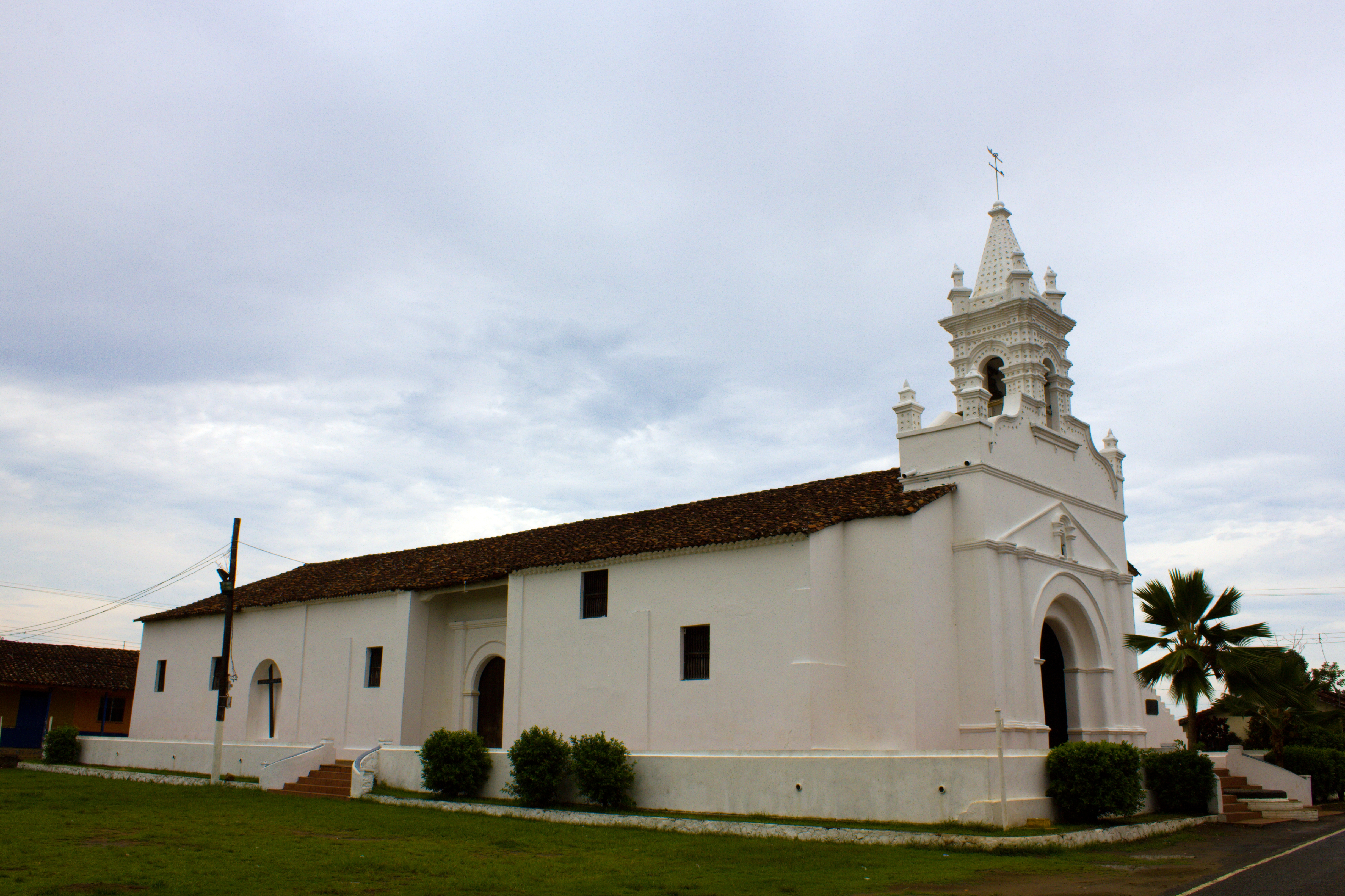 Iglesia Parroquial de Santo Domingo de Guzmán de Parita, Provincia de Herrera, Panamá.